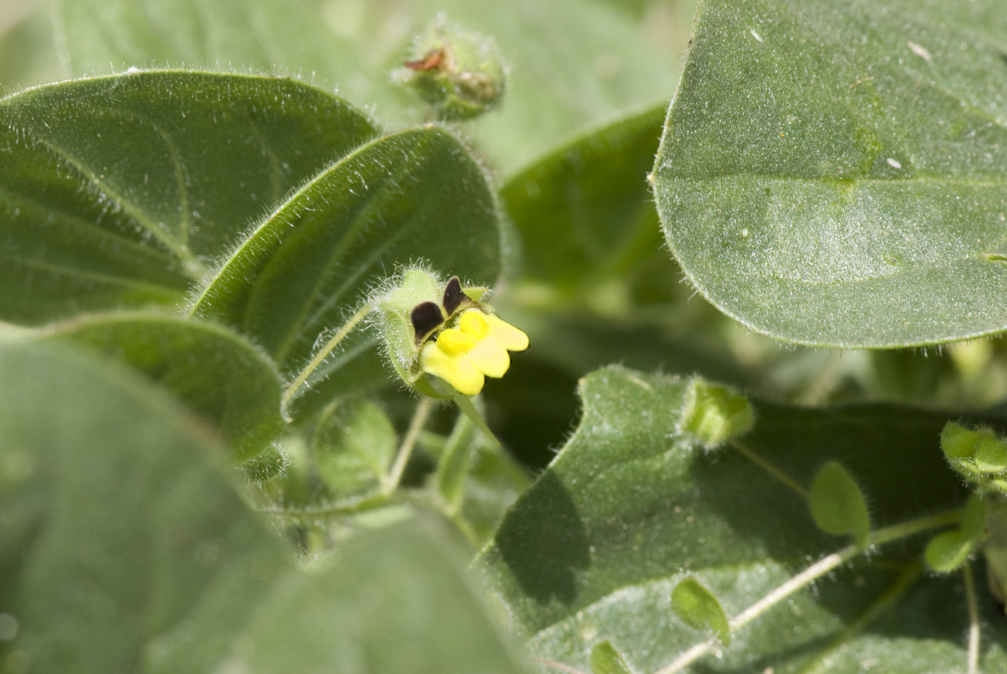 Kickxia spuria Vallée de Grâce à Amiens (Somme), France